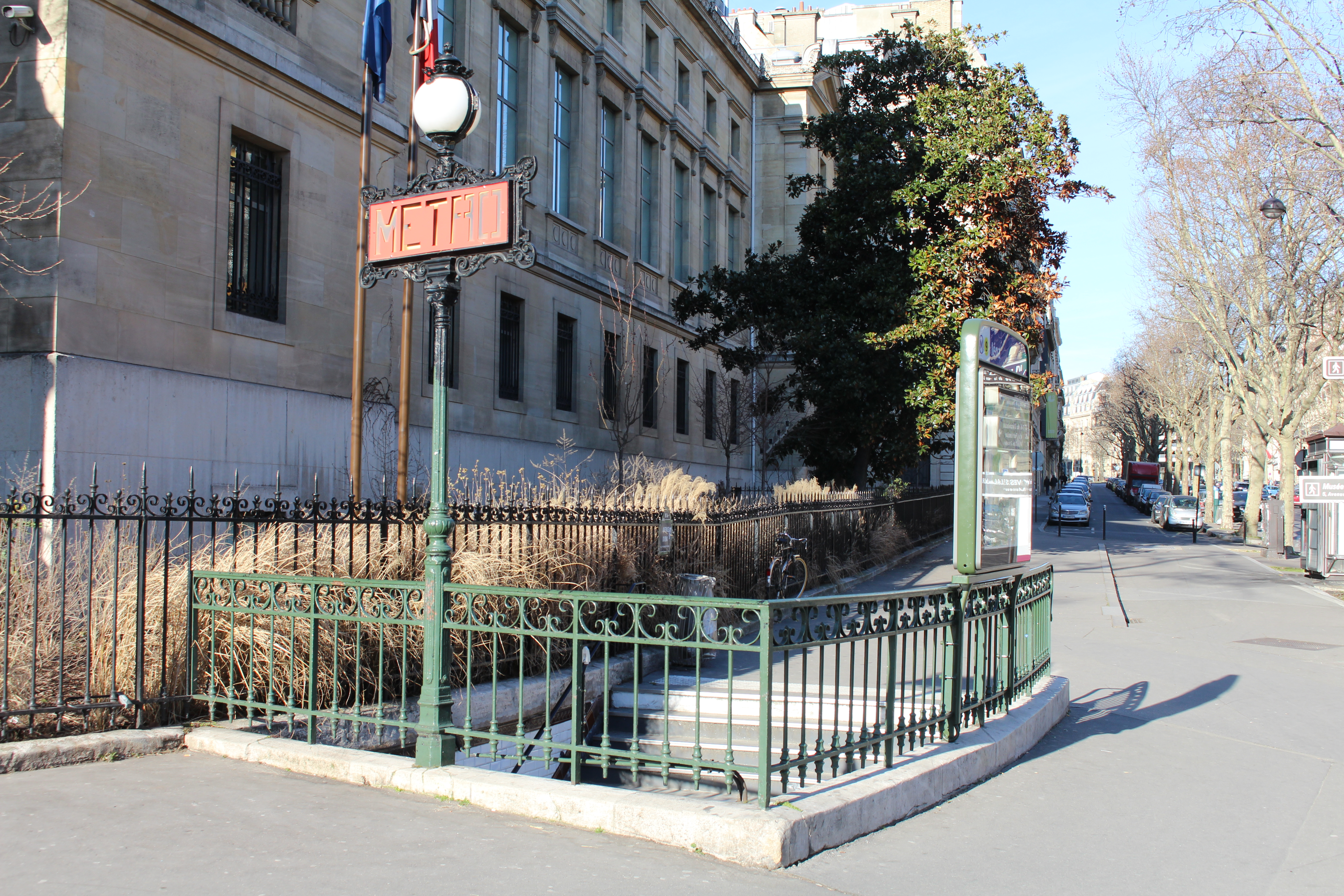 Entrée de la station de métro Iéna le long de l'avenue d'Iéna, Paris.